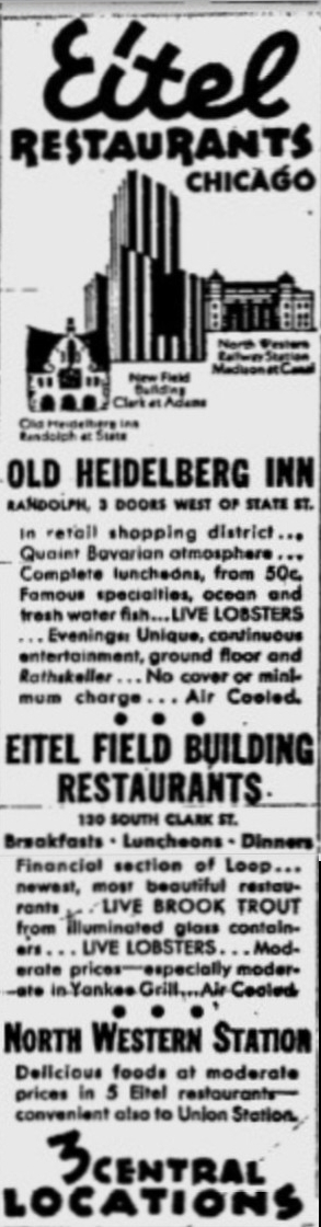 Anzeige Eitel Restaurants Chicago in den The Ludington Daily News vom 31. Juli 1935, Seite 4. In der Anzeige werden die drei Restaurants der Brüder Max und Robert Eitel beworben: das Old Heidelberg Inn, Ecke Randolph und State Street die Eitel Field Building Restaurants in dem 1934 neu erbauten Field Building, Ecke Clark und Adams Street die fünf Eitel Restaurants in der North Western Railway Station, Ecke Madison und Canal Street.